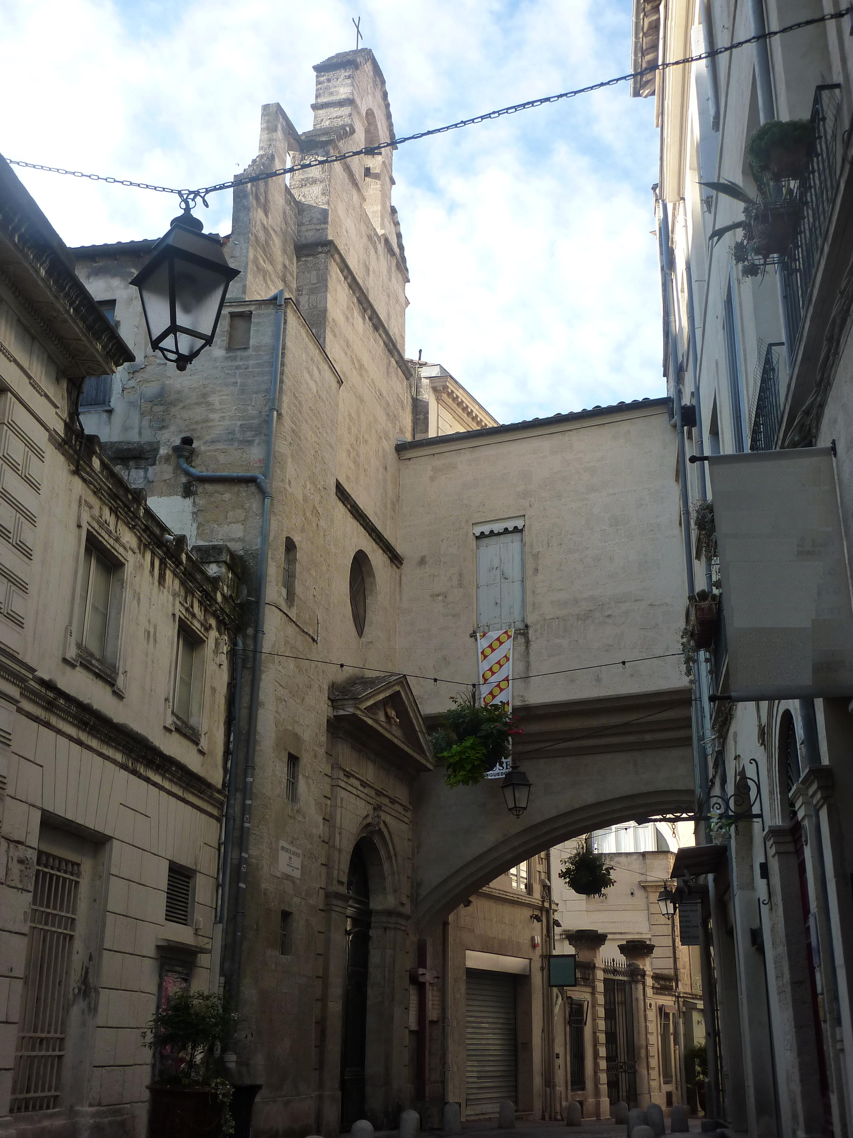 Entrée de la chapelle au 14 rue Jacques Coeur à Montpellier